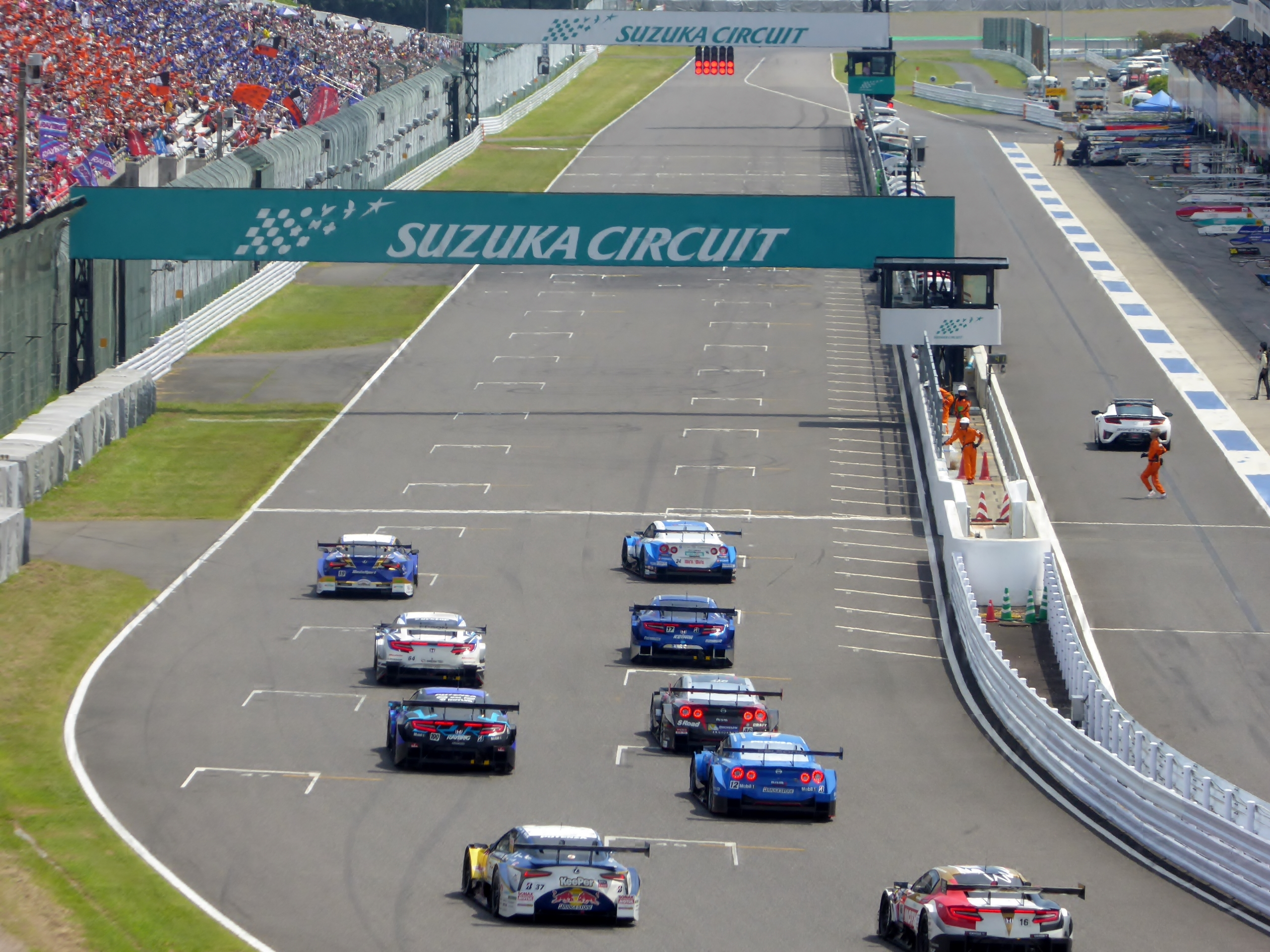 2017年鈴鹿1000kmにおけるフォーメーションラップを撮影。